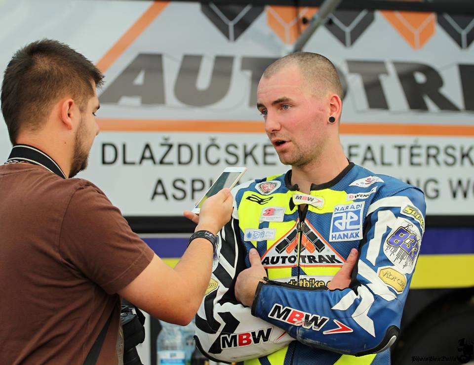 Pavel Kejmar poskytující rozhovor.